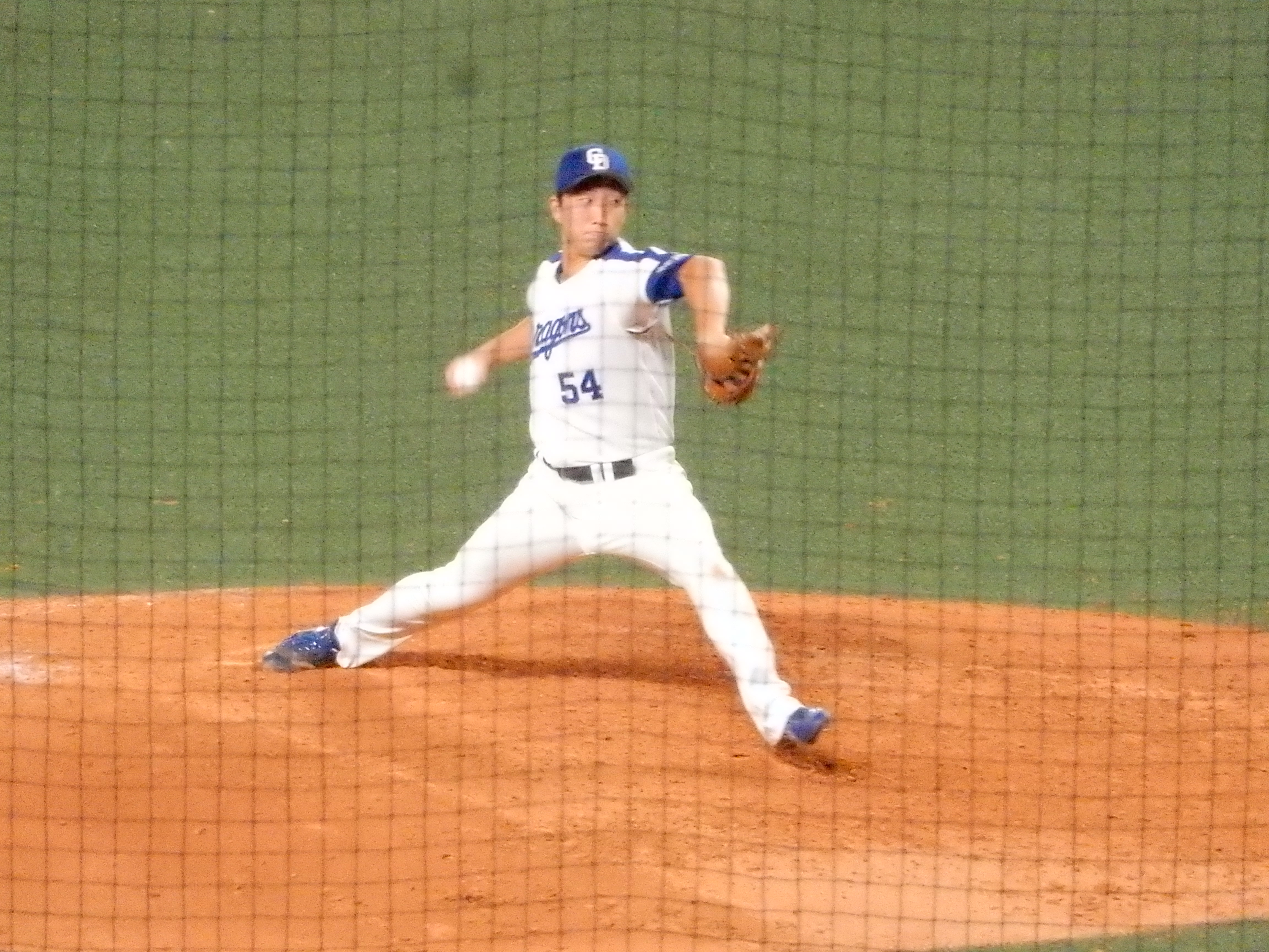 ナゴヤドームにて藤嶋選手